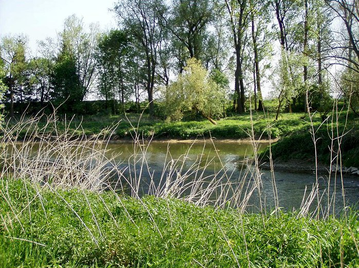 Mündung der Aschach in den Innbach